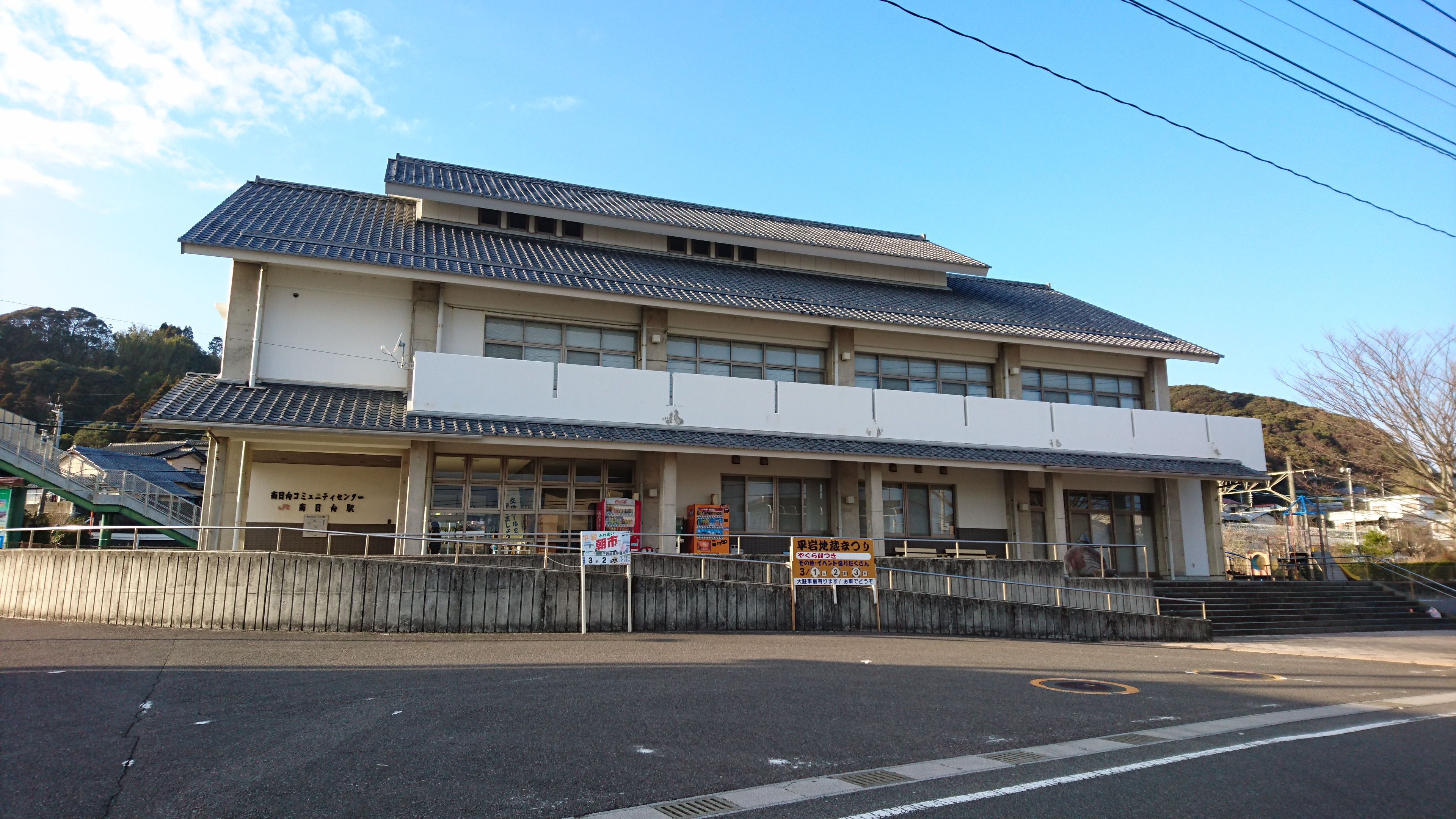 JR南日向駅・南日向コミュニティーセンター